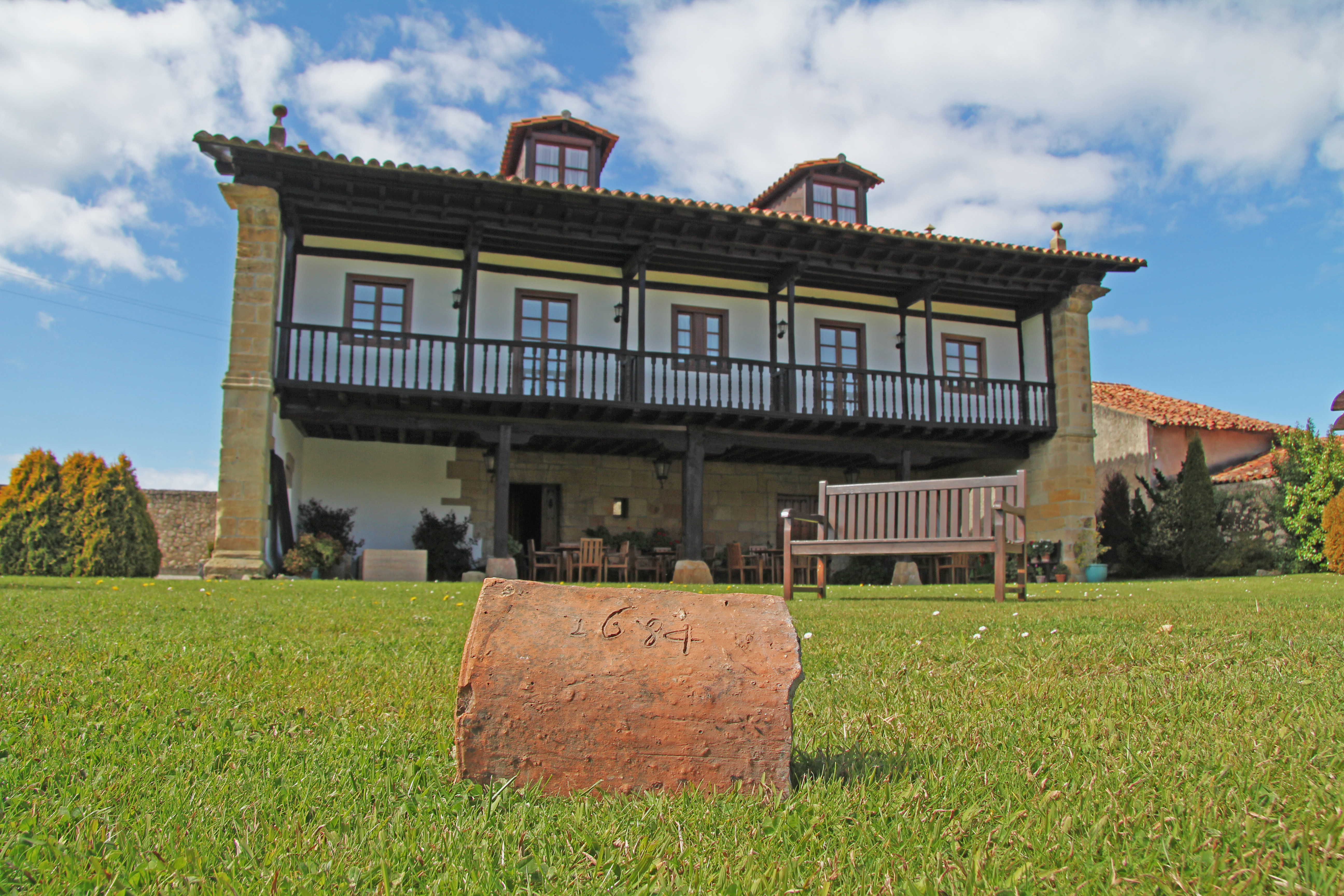 Casona de Cantabria de finales del siglo XVII. reconstruido en el año 2002,actual negocio deHosteleria.